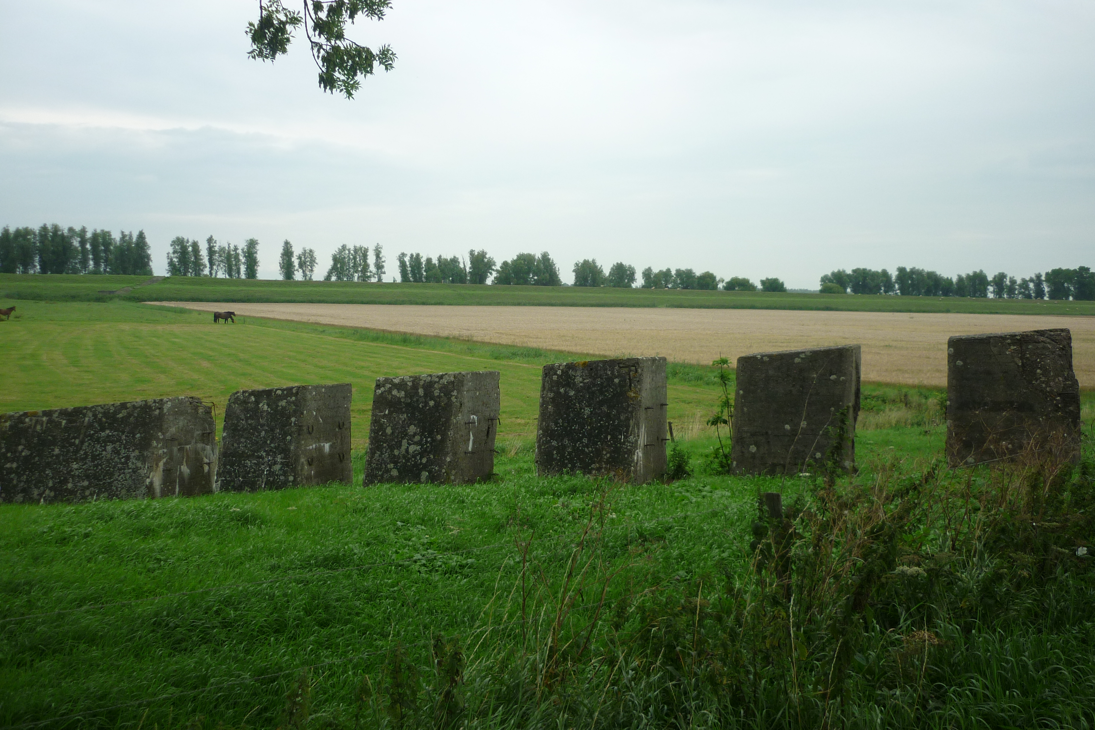 Tankval ten oosten van Lage Zwaluwe